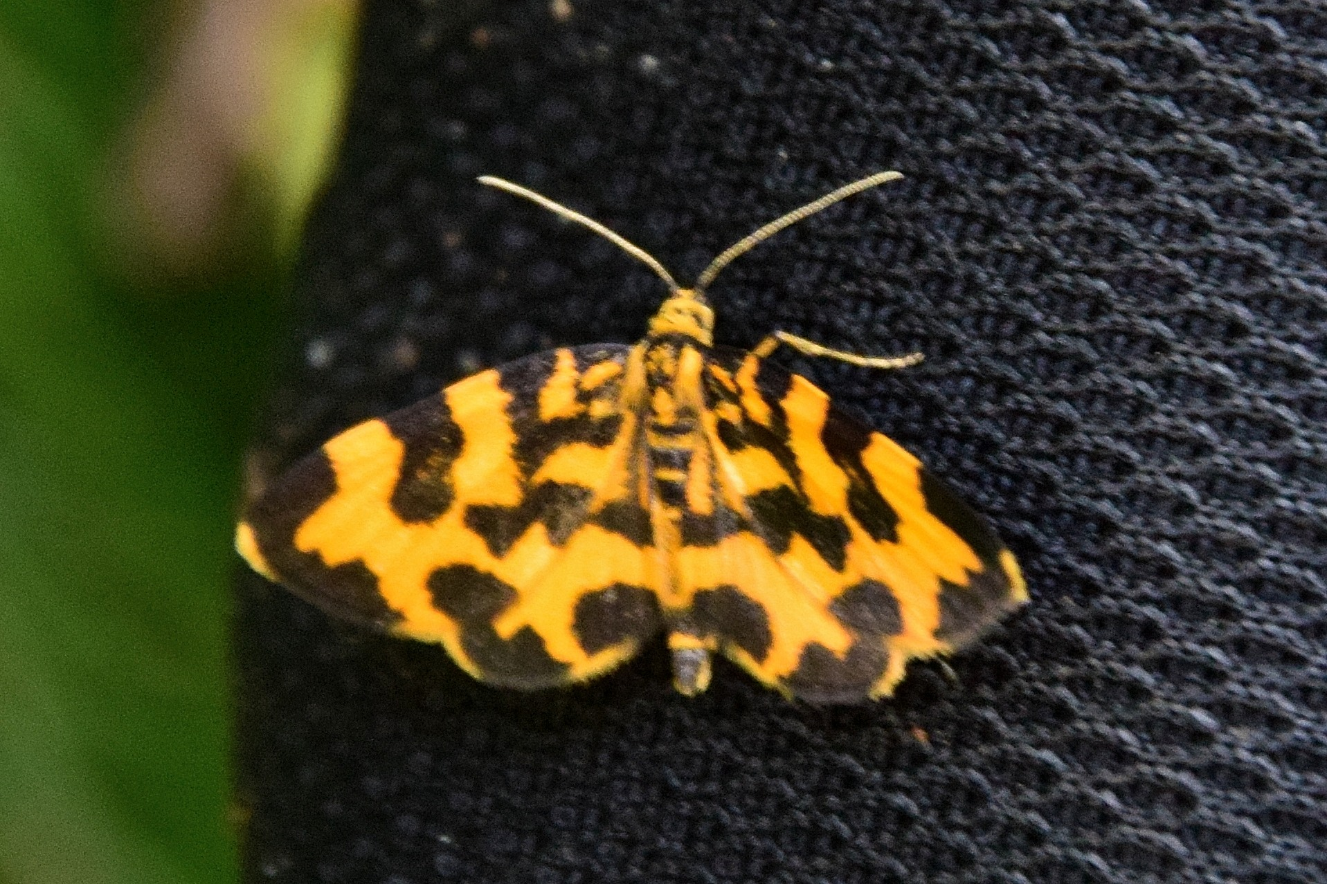 Тигирекский заповедник: в западном Алтае на водоразделе между притоками р. Чарыш и в верховьях р. Алей, на территории Змеиногорского, Третьяковского и Краснощековского районов на границе с Казахстаном, в 30 км к югу от пос. Чинета и 70 км к западу от с. Змеиногорск, Змеиногорский район, Алтайский край This image is related to the protected area of Russia number 2200057